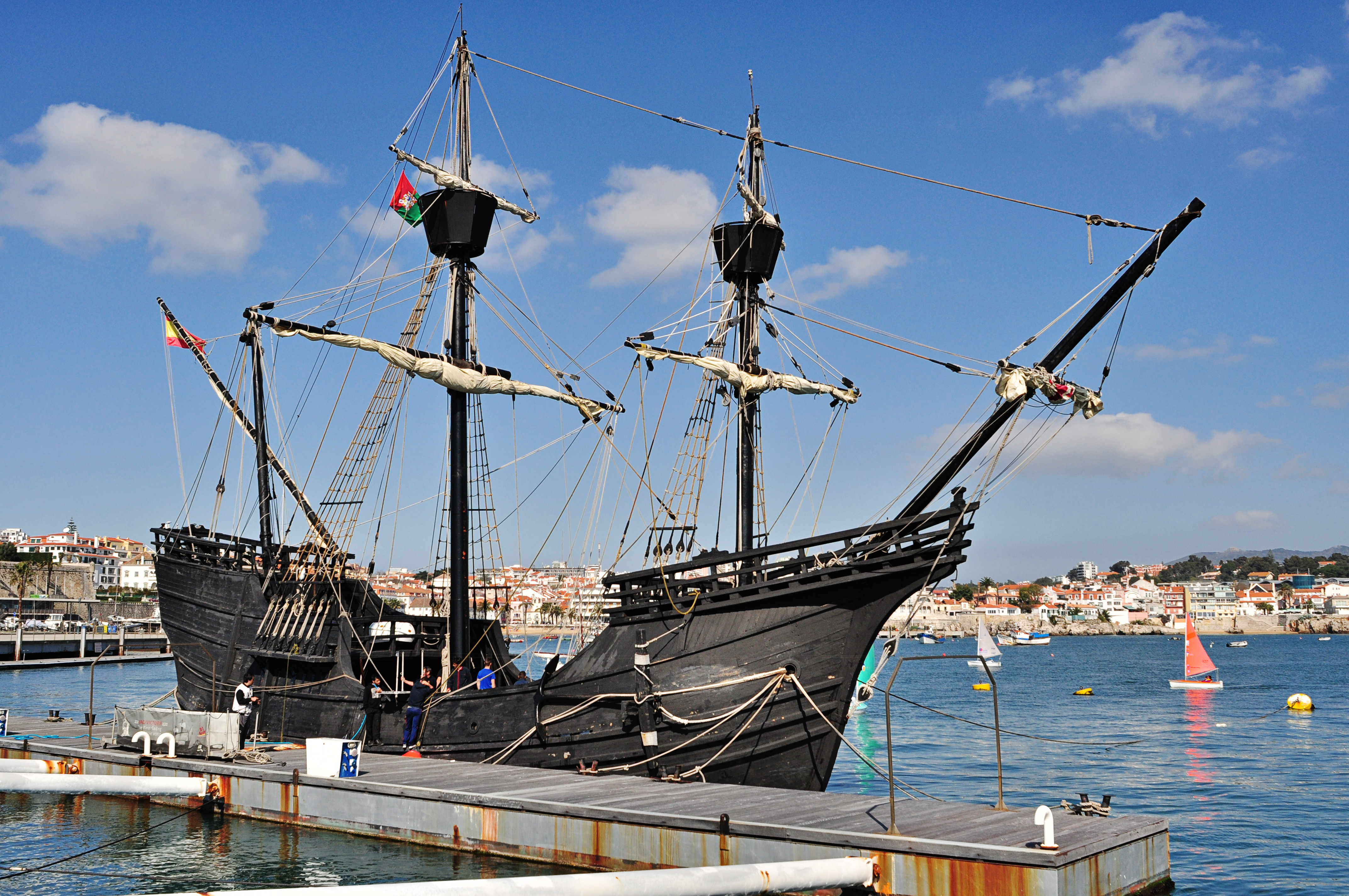 Victoria (or Nao Victoria, as well as Vittoria) was a Spanish carrack and the first ship to successfully circumnavigate the world. The Victoria was part of a Spanish expedition commanded by the Portuguese explorer Fernão de Magalhães (Ferdinand Magellan), and after his death during the voyage, by Juan Sebastián Elcano. The expedition began with five ships but the Victoria was the only ship to complete the voyage. Victoria was an 85 ton ship built in 1519, with a crew of 42. It disappeared en route to Seville from the Antilles, 1570. (Adapted from Wikipedia). Seen here is a replica built in 1992, visiting the Cascais marina in 2015. / / ----- Victoria foi um nau comandada por Fernão de Magalhães e Juan Sebastián Elcano. O navio foi um dos cinco barcos que iniciaram a primeira volta ao mundo e foi o único que retornou à Espanha, sendo assim o primeiro barco a circumnavegar o globo. A Victoria era um barco de 85 toneladas construido em 1519, com uma tripulação de 42. O barco desapareceu em rota para Sevilha das Antilhas, em 1570. (Adaptado da Wikipedia (en) e (pt)). A foto mostra uma réplica construída em 1992, aqui visitando a marina de Cascais em 2015.